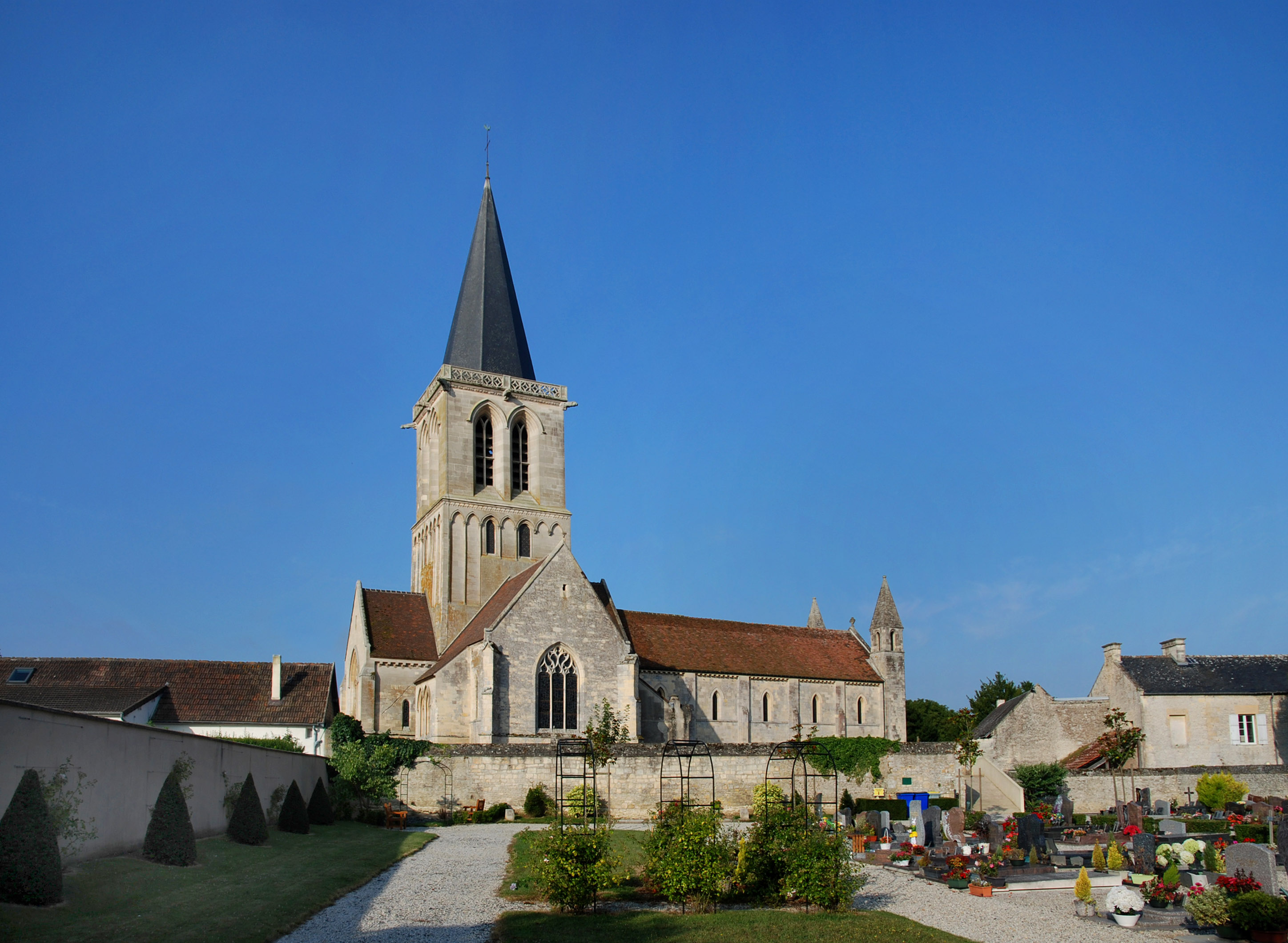 Rots (Calvados)